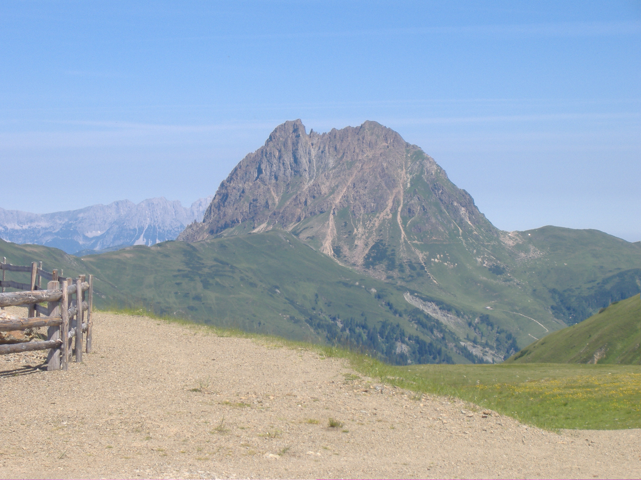 Großer Rettenstein, Kitzbüheler Alpen, Salzburger Land, Österreich